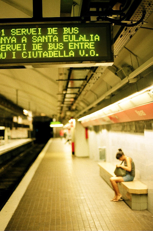 noelia en el metro